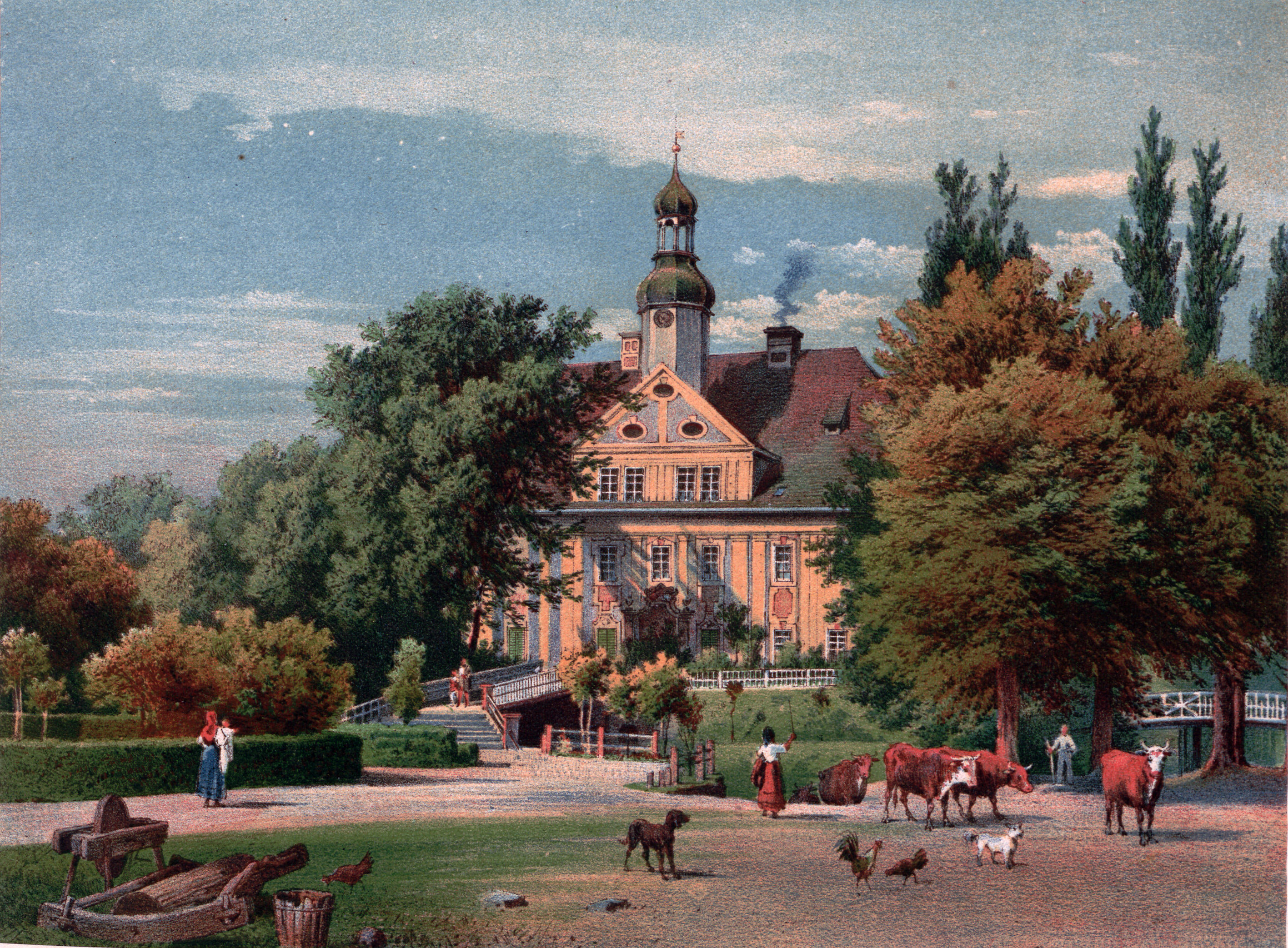 Lithografie des Schlosses Eichholz in Warmątowice Sienkiewiczowskie, Niederschlesien